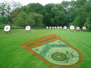 Fita-Platz der Bogensportgilde